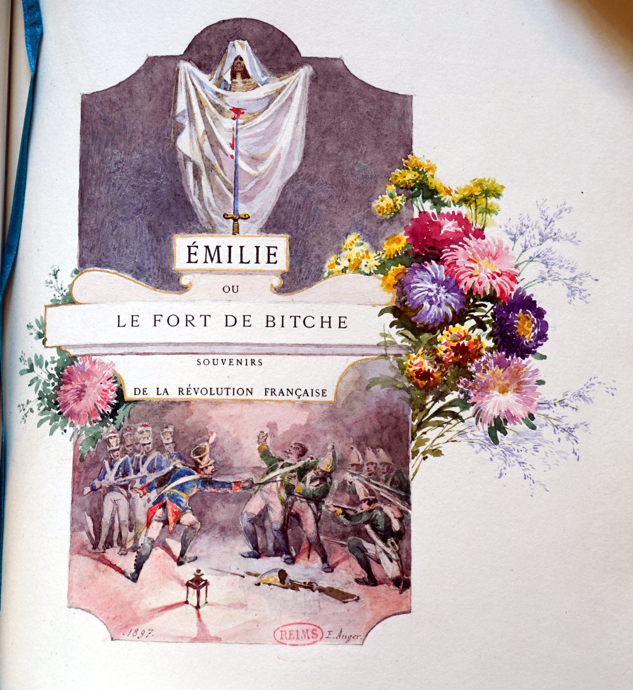 édition illustrée par Auger pour Diancourt.